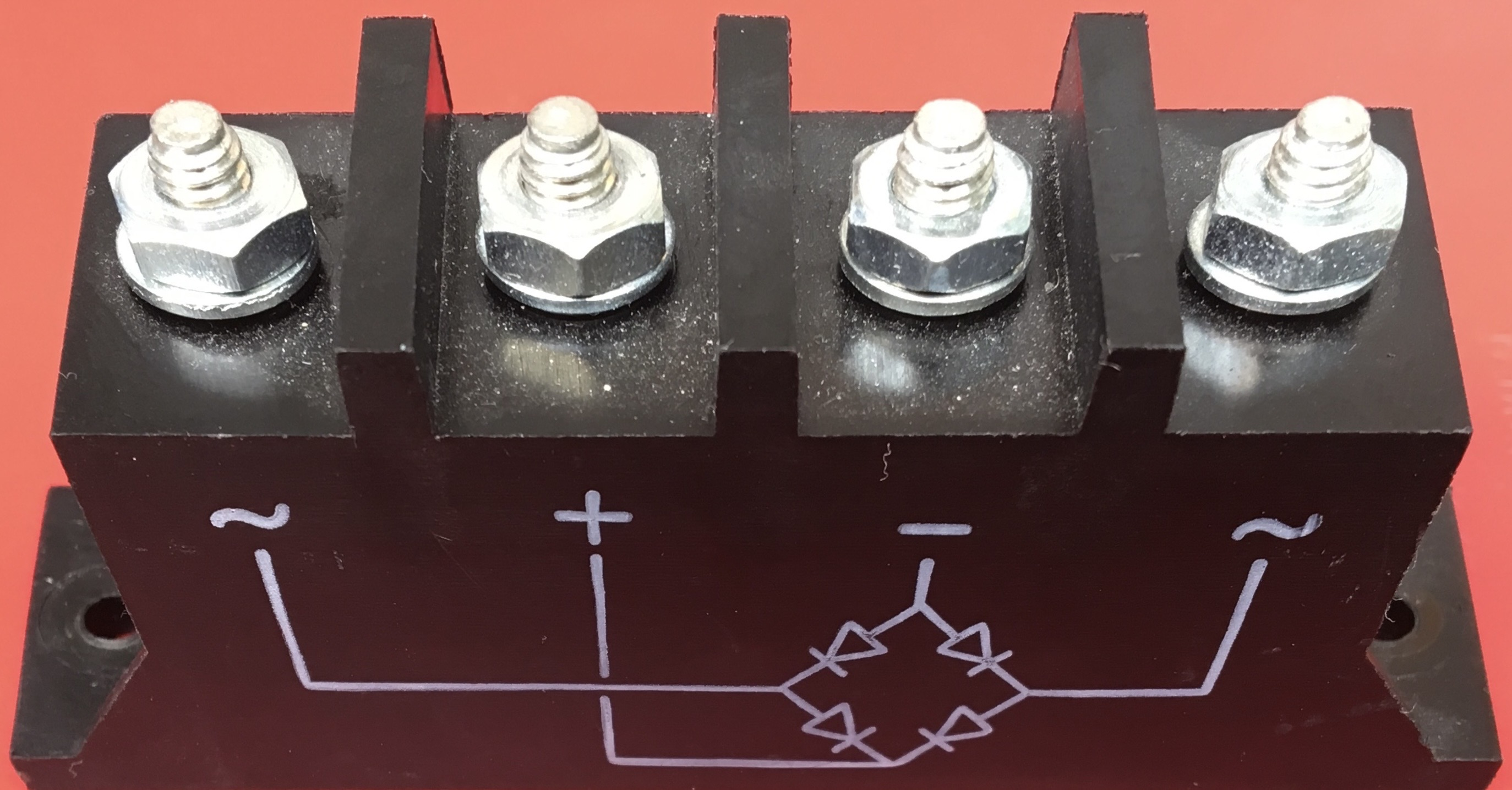 Pont de diode monophasé